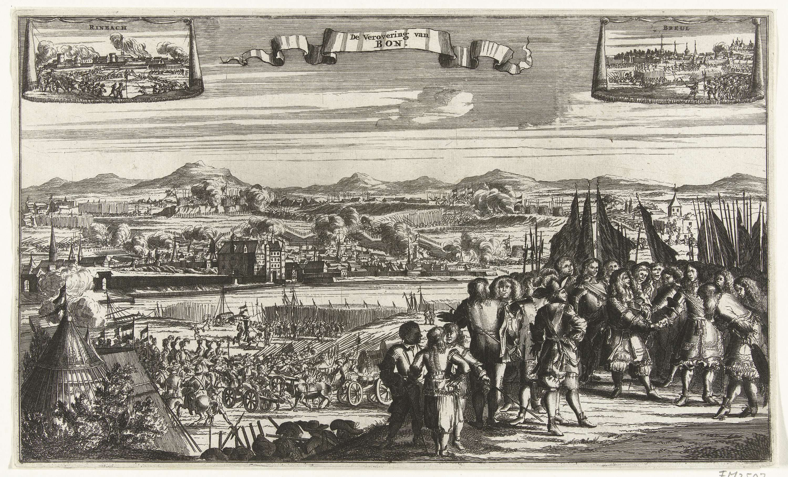 Belagerung Bonns durch Wilhelm III von Oranien im Jahr 1673 während des Holländischen Kriegs (Rijksmuseum, Niederlande)